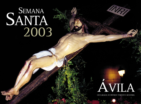 Cartel de Semana Santa del año 2003